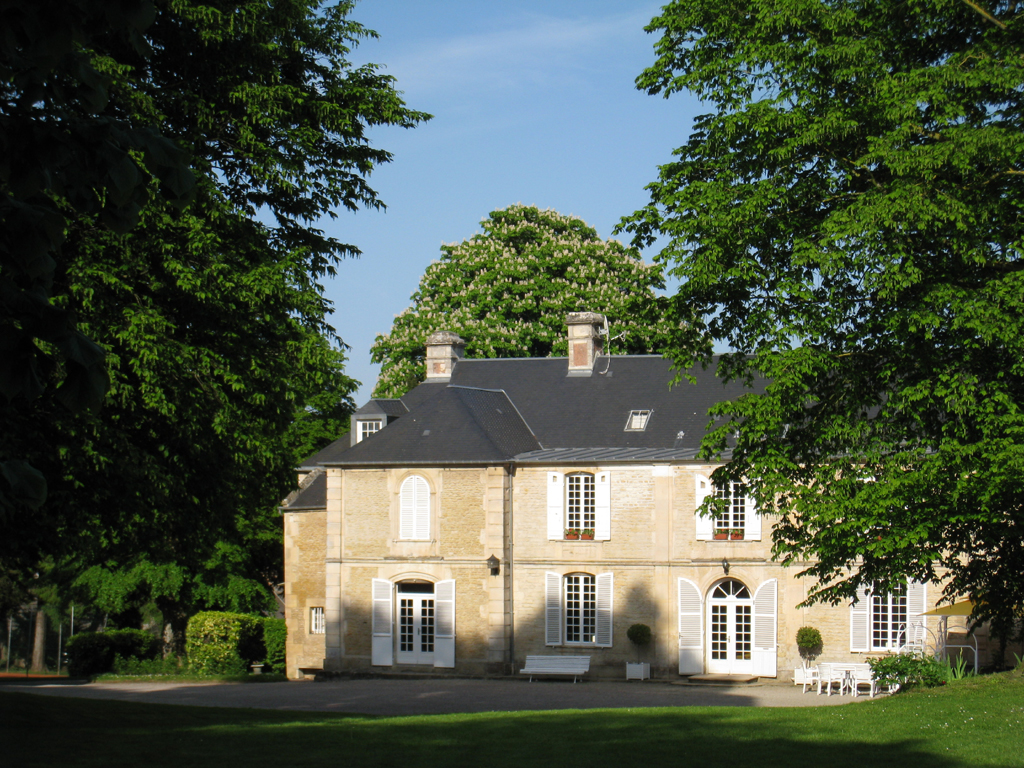 Vue partielle de la façade du château de Guernon-Ranville